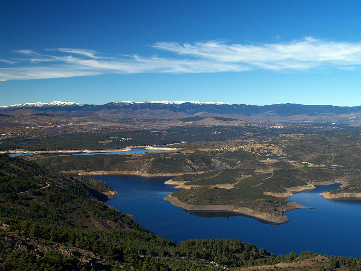 Los terrenos en los que se localiza el embalse, sobre pizarras, esquistos y cuarcitas, aparecen como relieves de no gran altitud, pero sí agrestes, con pendientes acusadas entre cumbres y profundos valles que dificultan las comunicaciones.